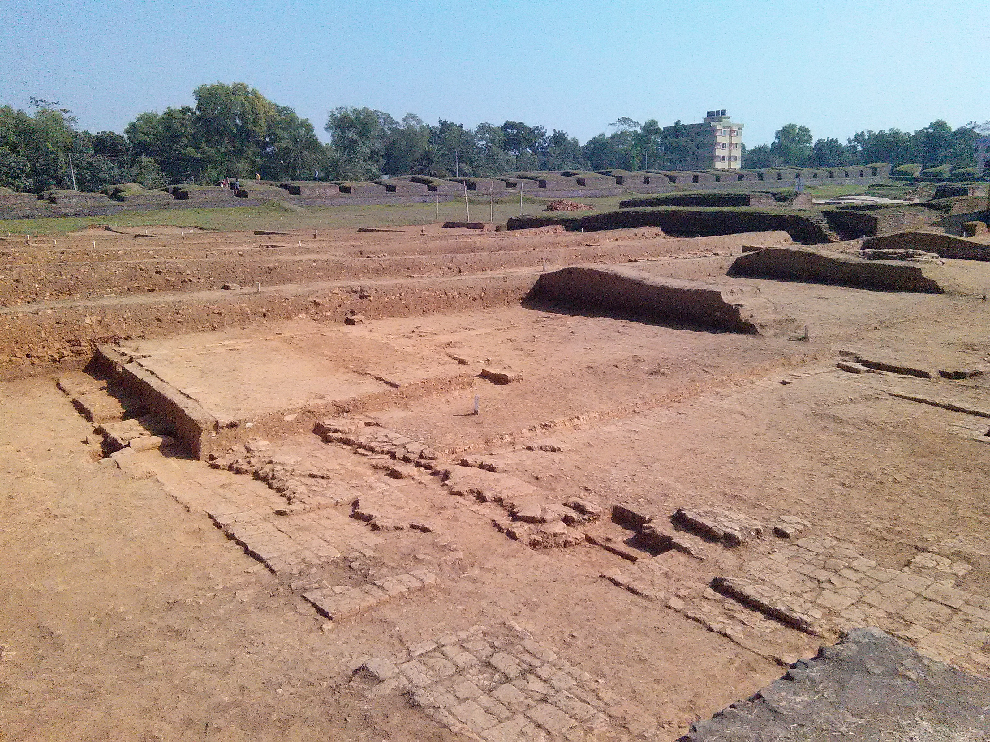 Comilla Coatbari.jpeg